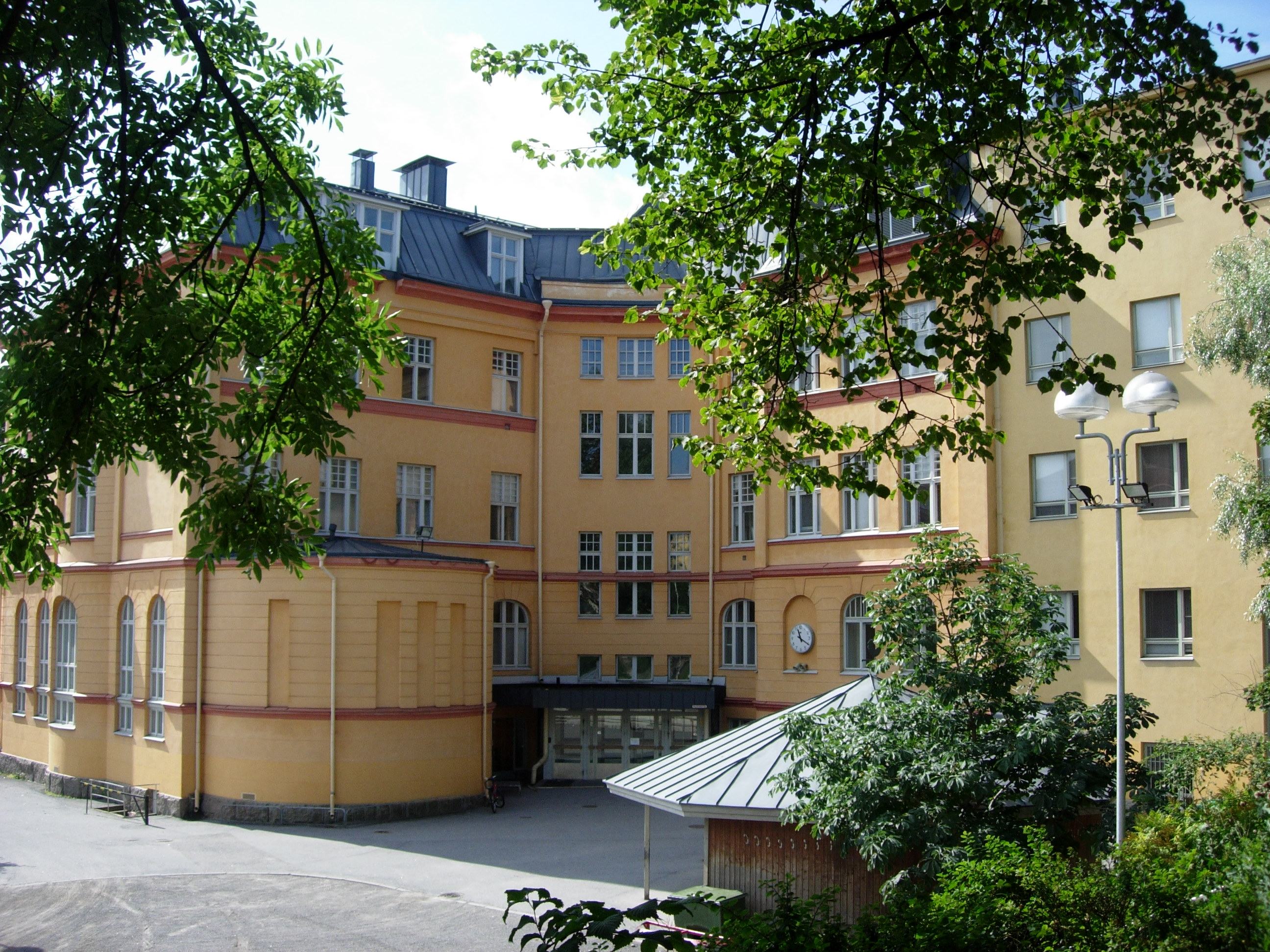 Cygnaeuksen koulu, Maariankadun ja Aurakadun kulmassa. Entinen Turun lyseon rakennus. VI kaupunginosa, Turku.